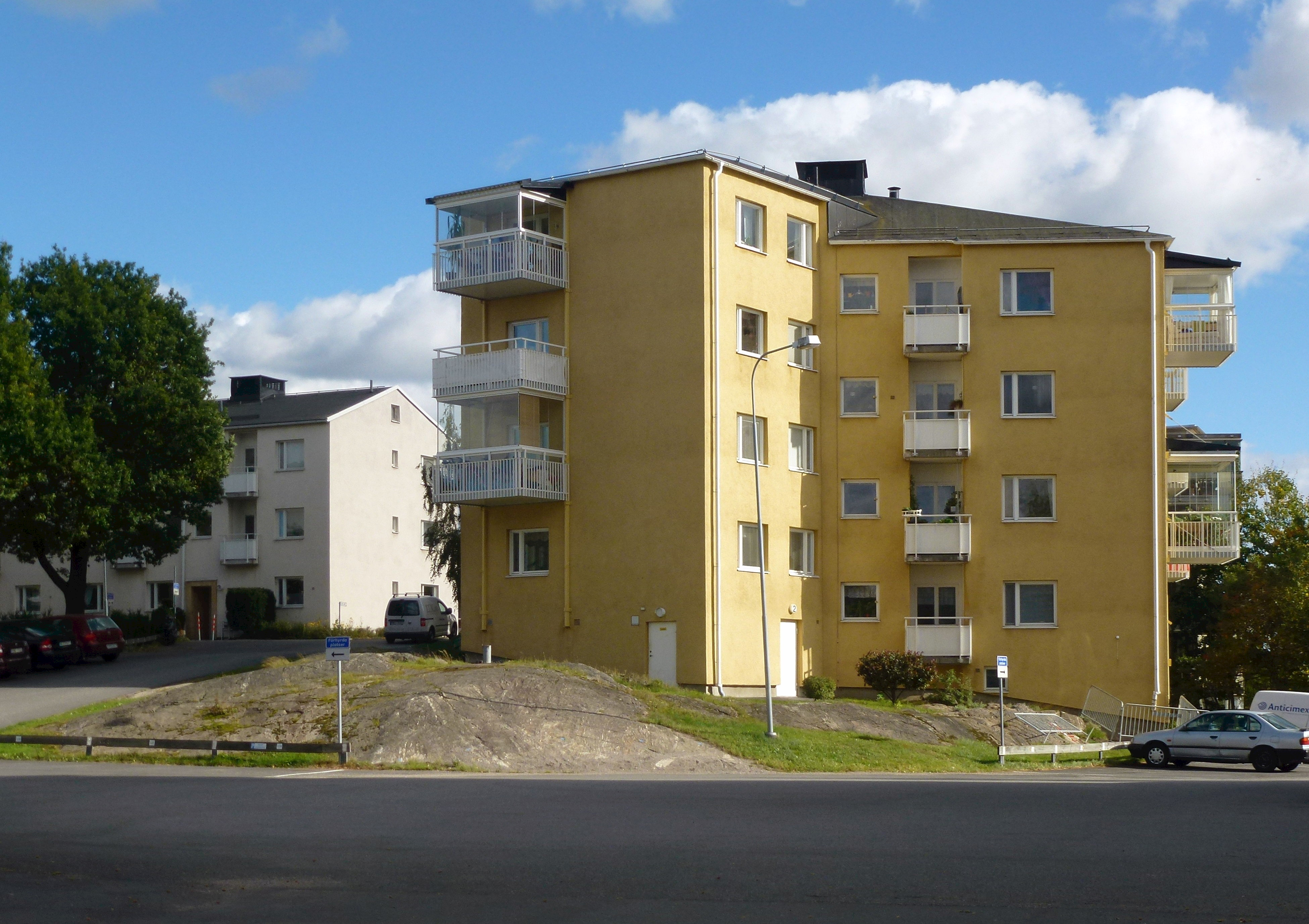 Stjärnhus på Finnberget